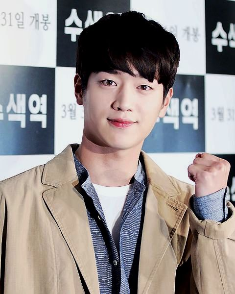 2016년 3월 15일 수색역 VIP 시사회에서의 서강준.